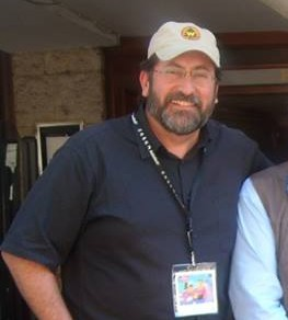 Bob Peterson au FIFA 2015